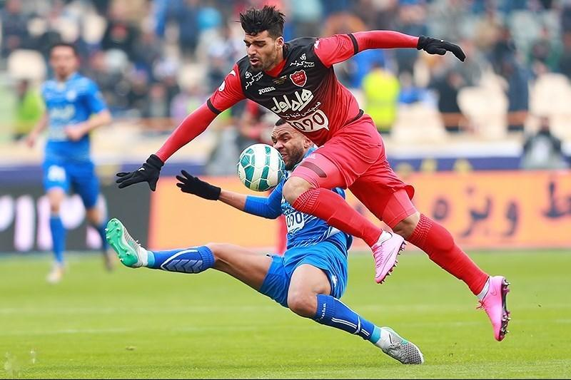 Esteghlal Edges Past Persepolis 3-2 to Claim Tehran Derby - TEHRAN (Tasnim) - The 84th Tehran derby between Iran’s professional football teams Persepolis (Reds) and Esteghlal (Blues) held at Azadi Stadium, west of Tehran, with a 3-2 win for Esteghlal.